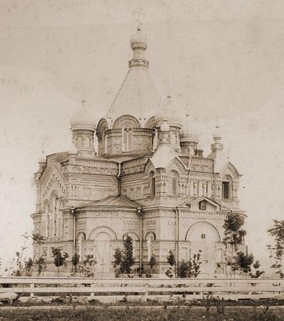 Церковь Святого Пантелеимона old1915